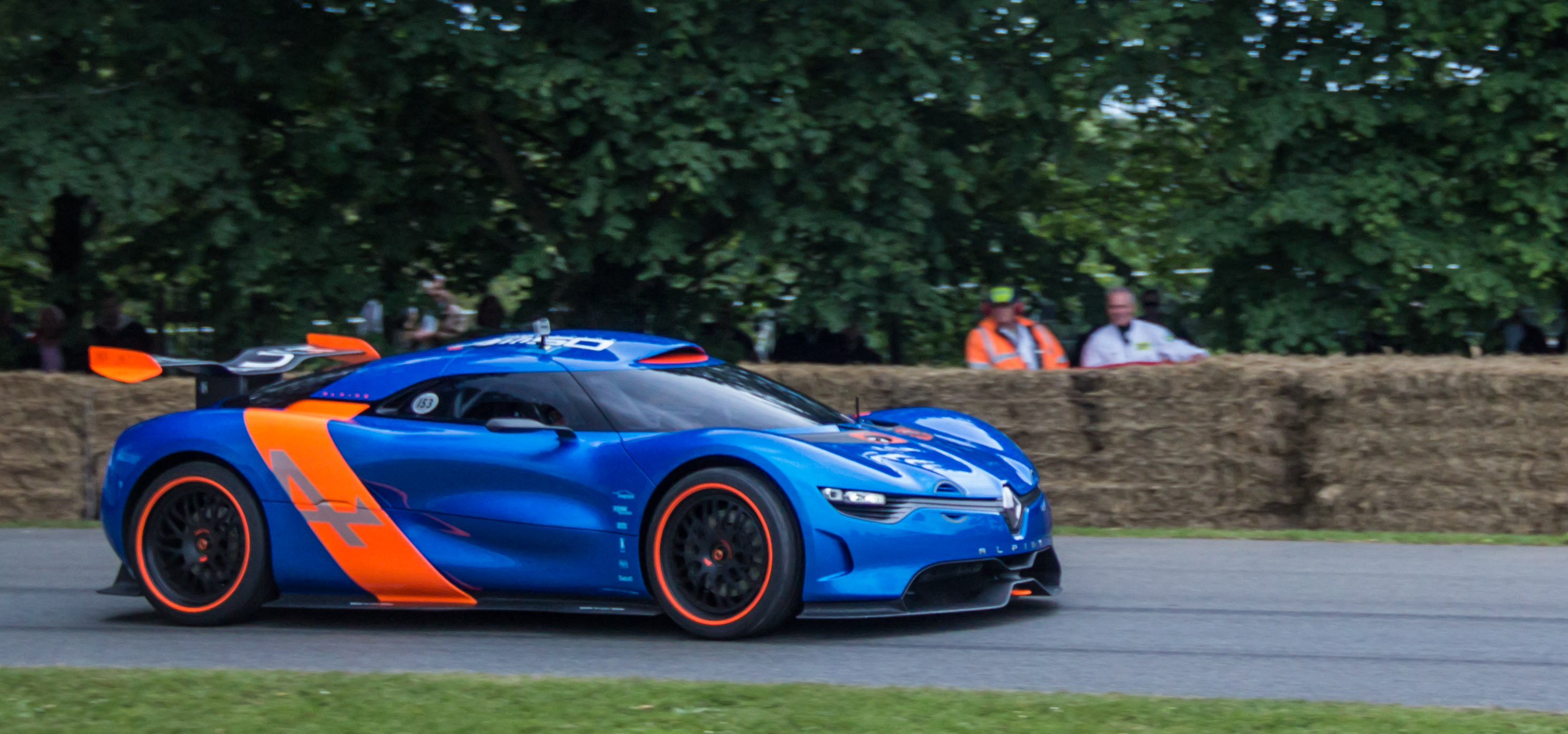 Vive la france. Magnifique